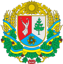 Герб Летичівського району